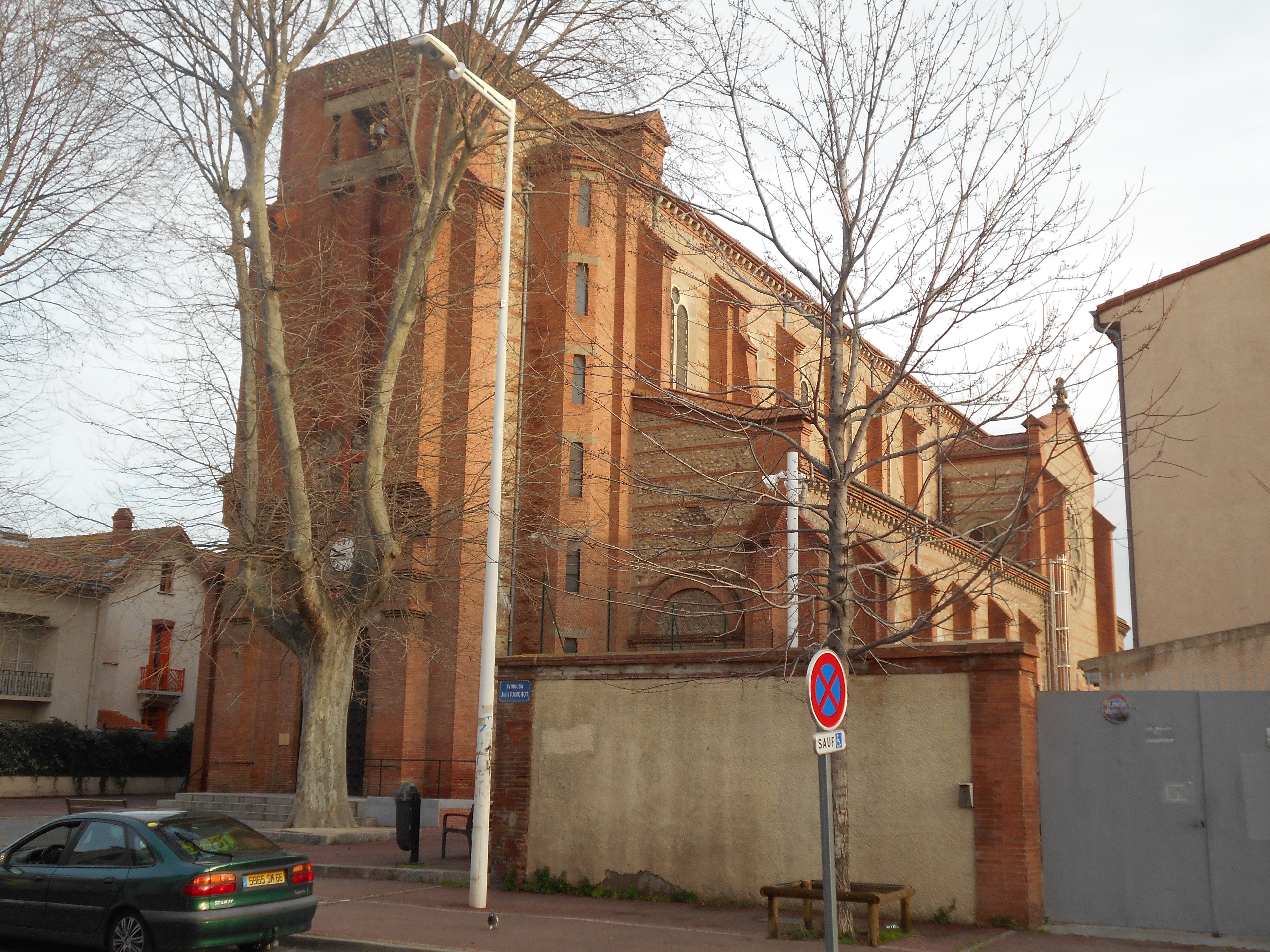 Església parroquial de Sant Martí de Perpinyà